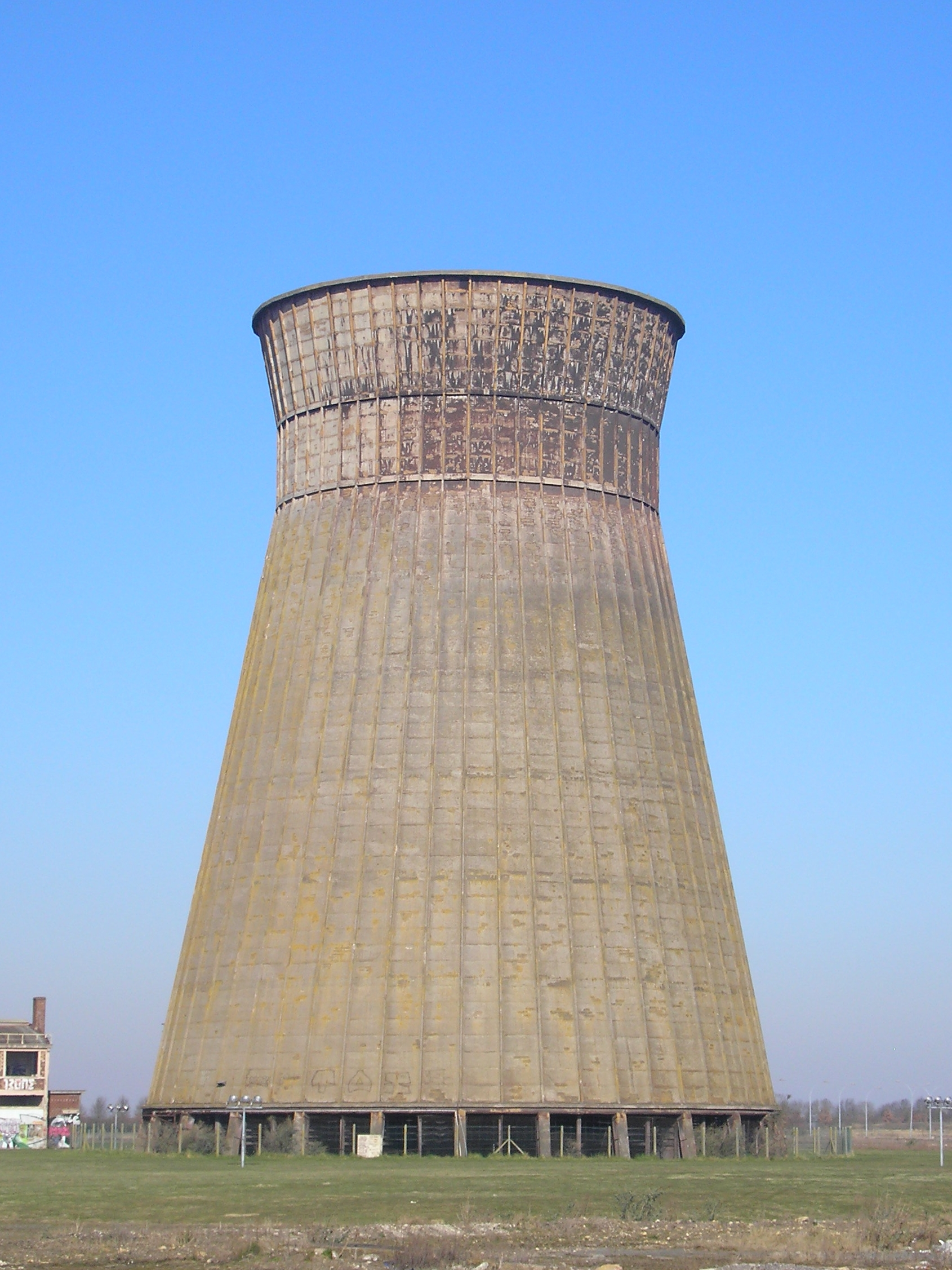 Colombelles (Normandie, France). Grand réfrigérant, vestige de la Société Métallurgique de Normandie.